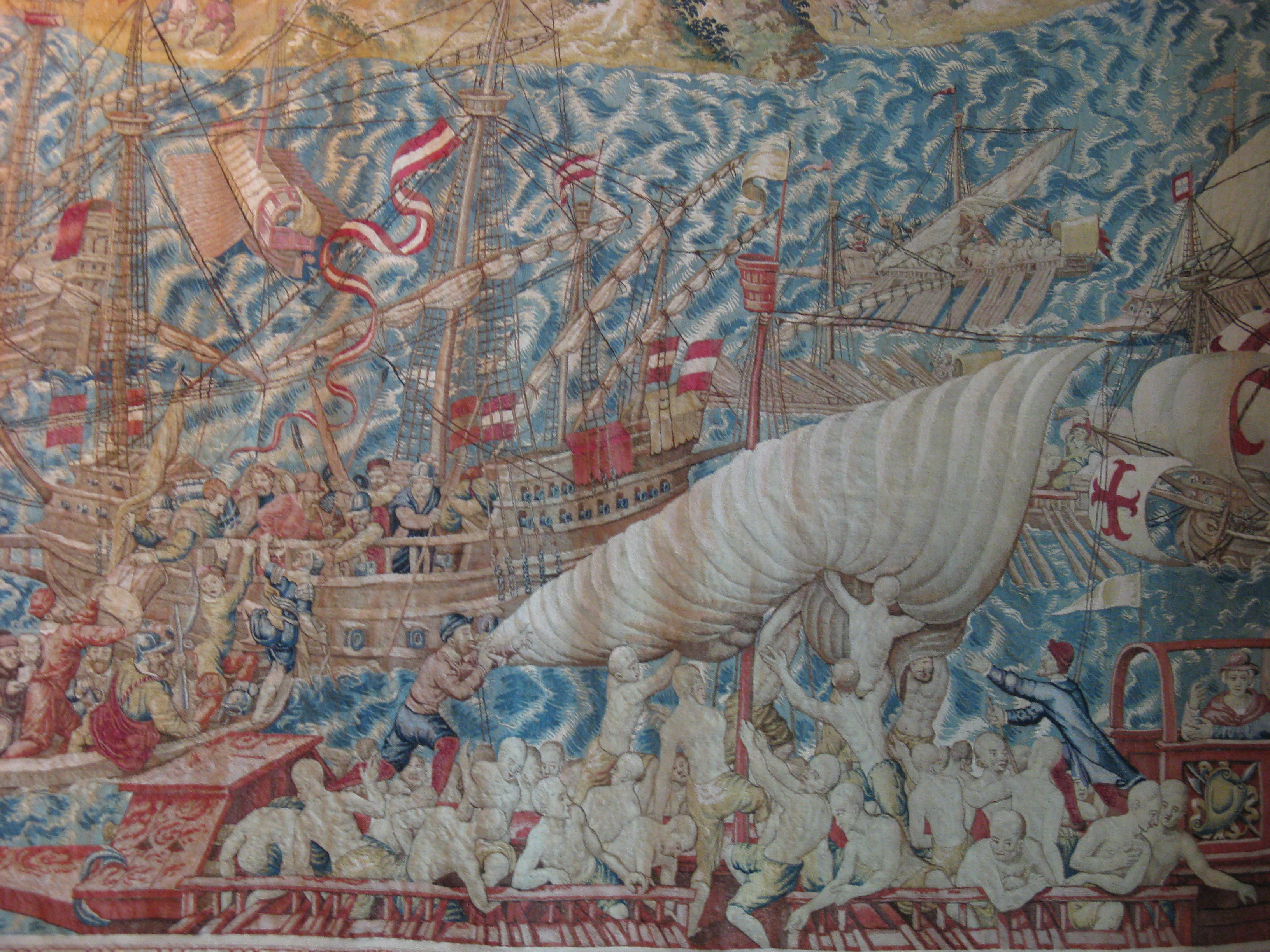 Het Mechelse tapijt was eigendom van Kardinaal Granvelle die toen bij De Pannemaker een aantal tapijten bestelde in 1564 → De slag bij Tunis, 1535